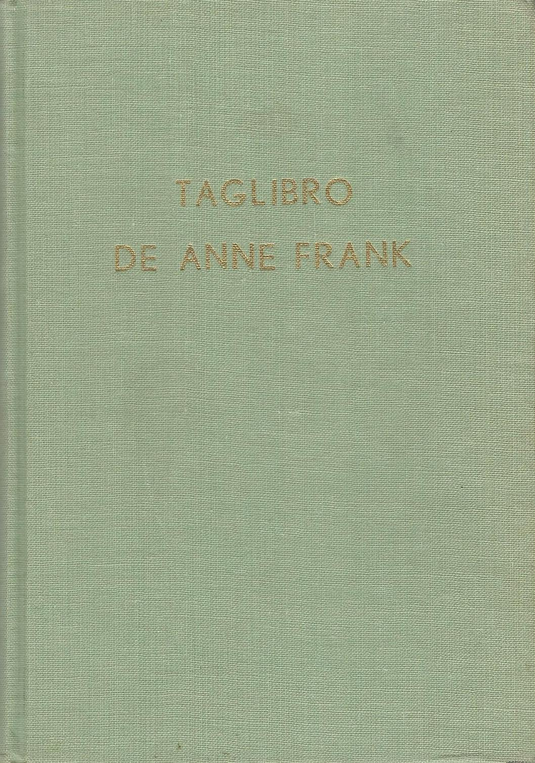 librokovrilo de "Taglibro de Anne Frank", 1959